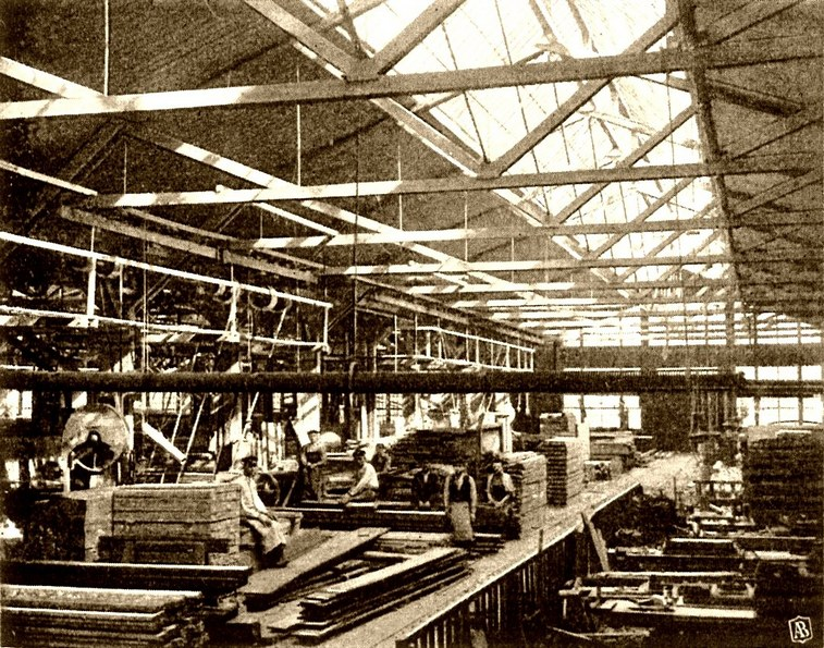 Лесообделочная мастерская Путиловского завода в начале 1900-х годов. Фотография.